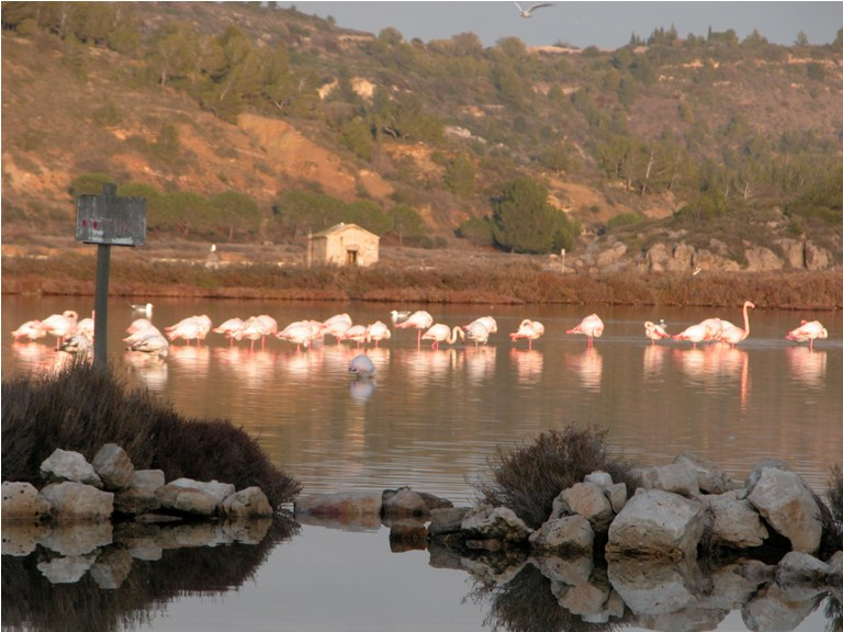 Famants roses à Bages